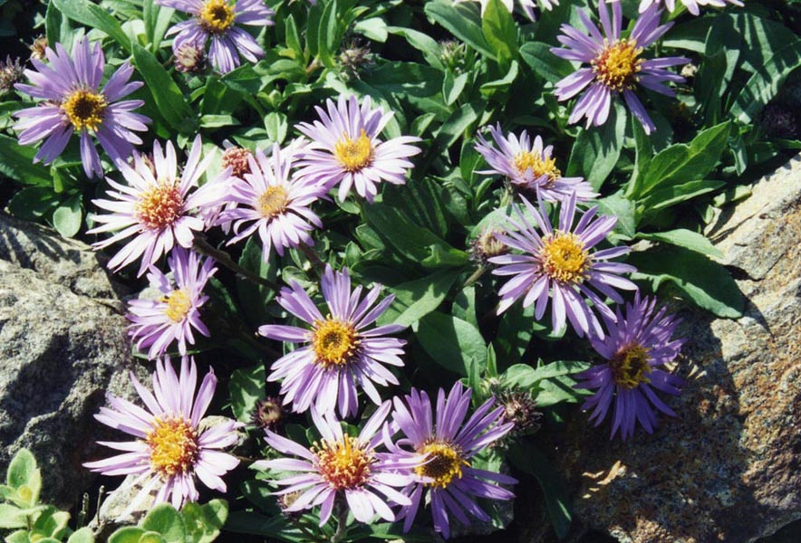 Aster sibiricus